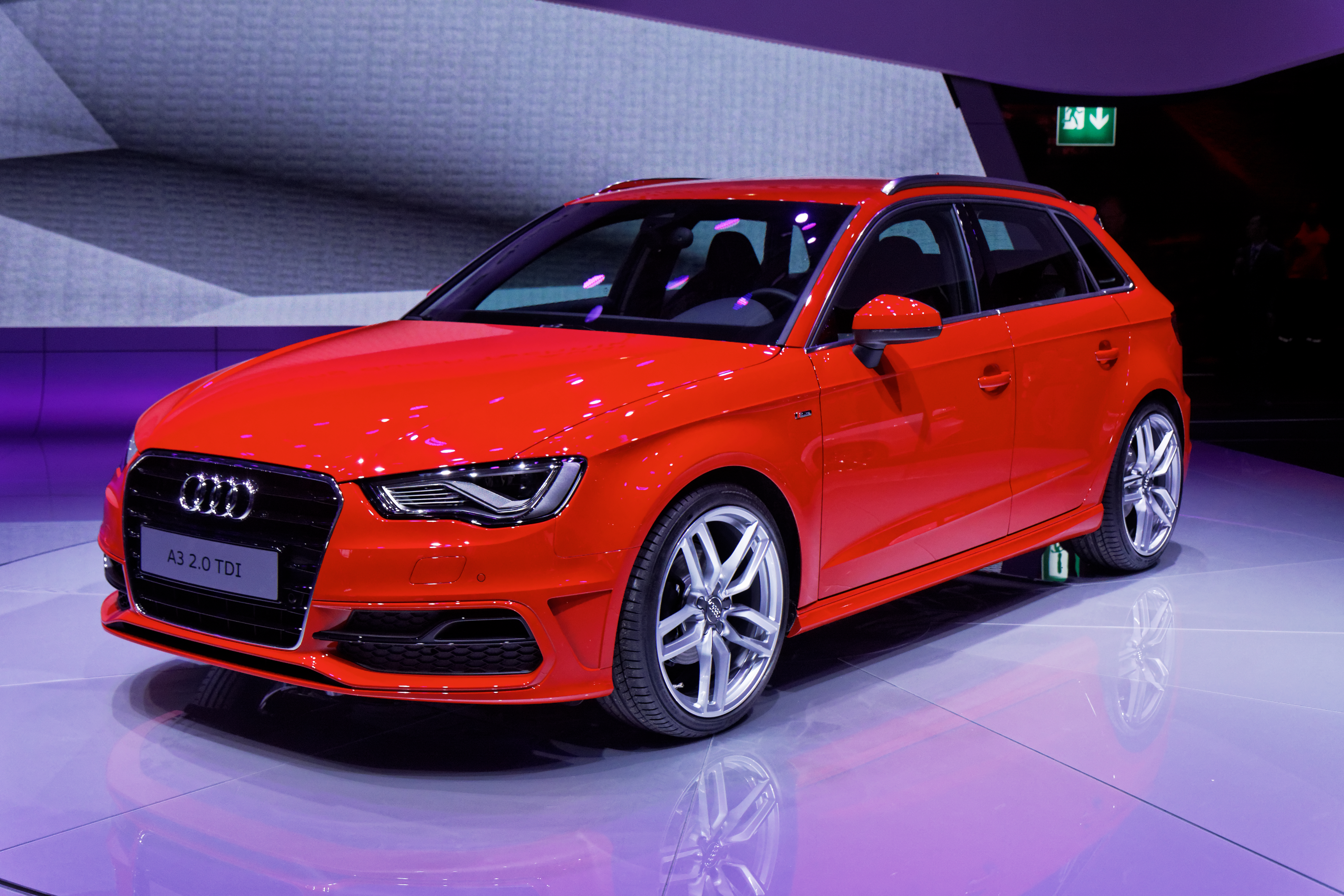 Une Audi A3 présentée lors du Mondial de l'Automobile de Paris 2012.